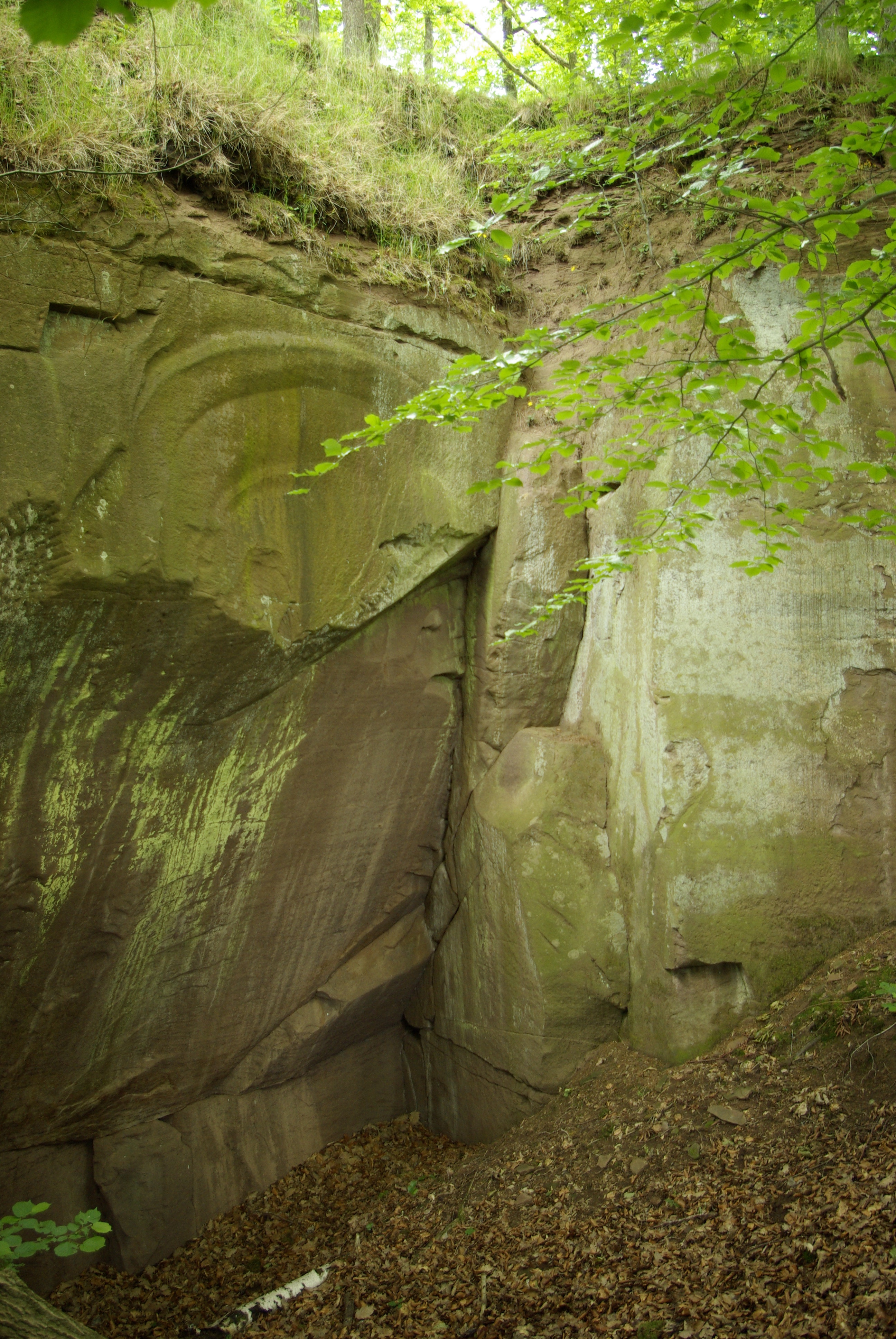 Steinbruch östlich der Fingalshöhle bei Obernzenn, Geotop 575A002.